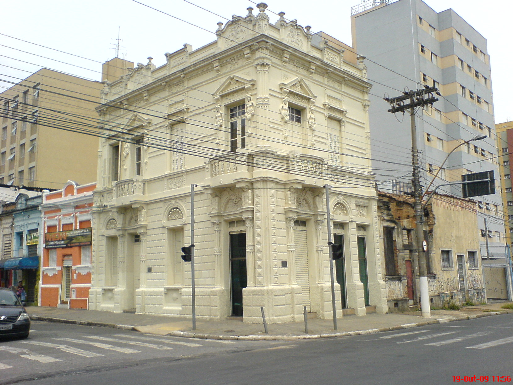 Imovel Antigo na Vila Industrial proximo ao Centro - Campinas SP